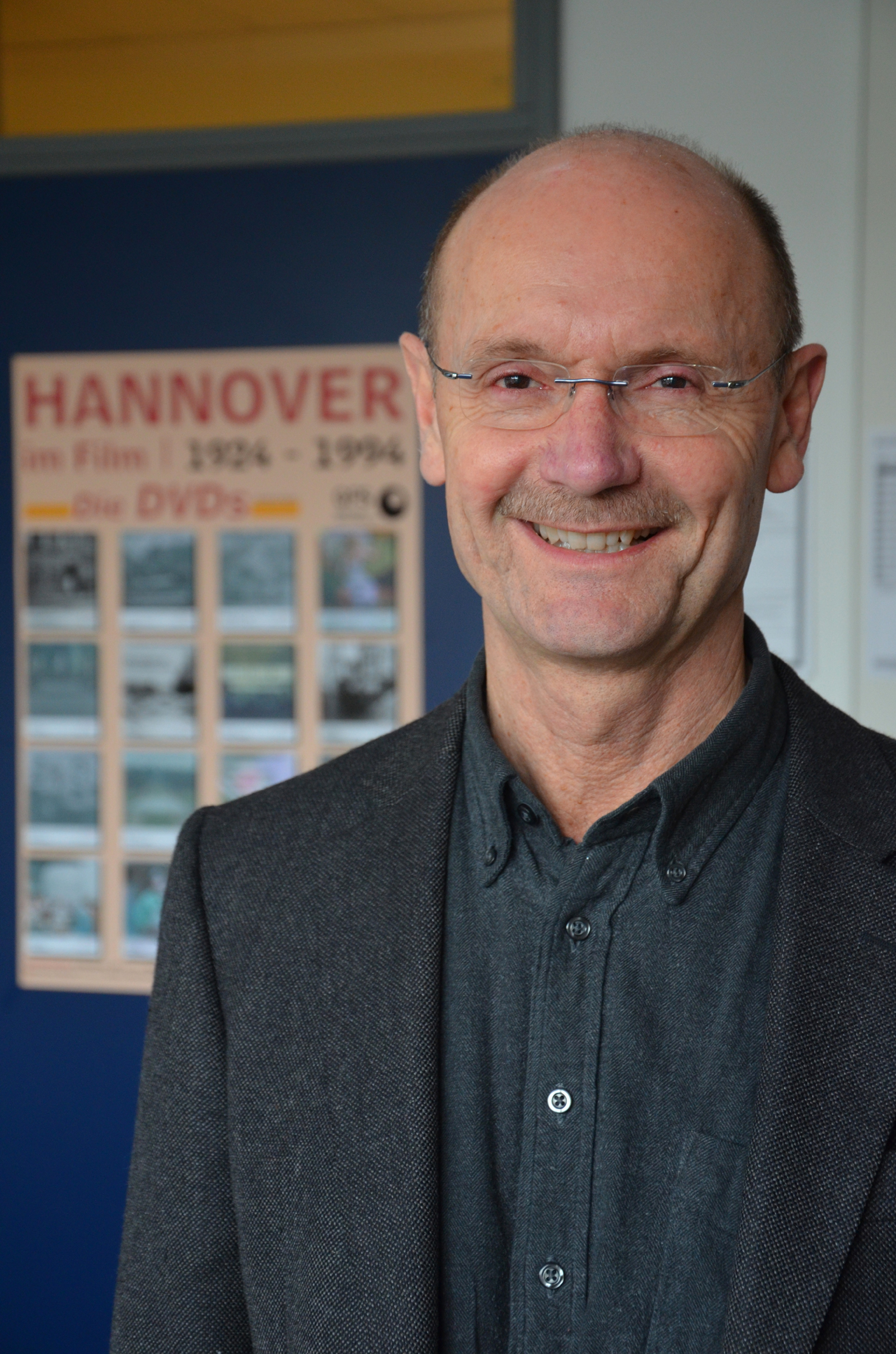 Dr. Peter Stettner, Mitarbeiter an der Hochschule Hannover (University of Applied Sciences and Arts), Fakultät Medien, Information und Design, Leiter des dortigen Kulturarchivs sowie Leiter der Gesellschaft für Filmstudien, hier am 21. Januar 2015 in seinem Büro Expo Plaza 12, Raum 307 ...